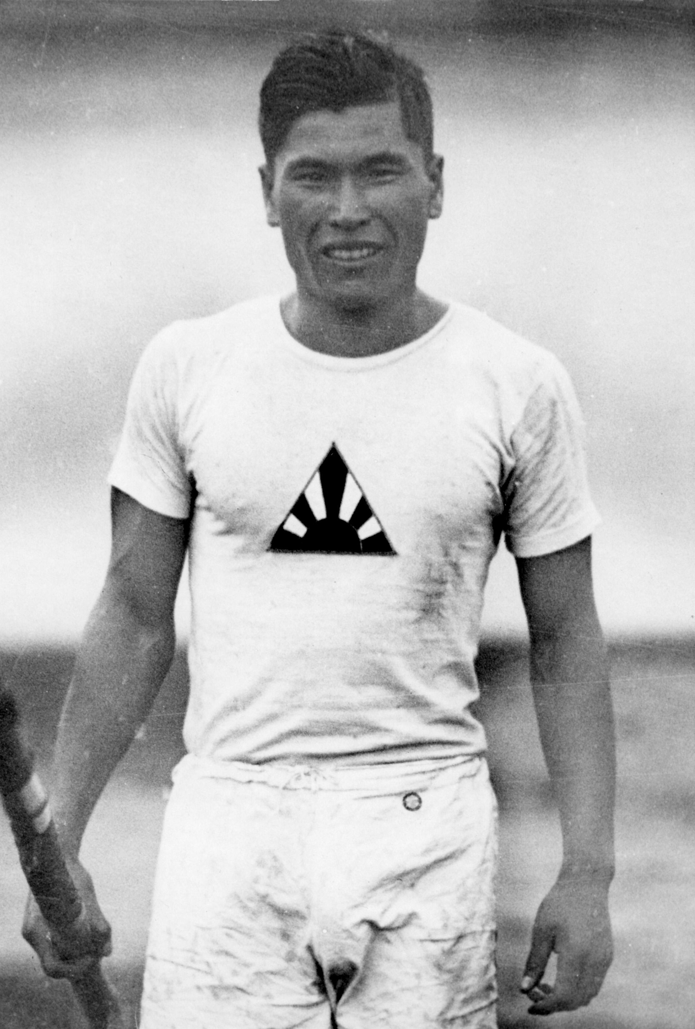 Sport, Olympische Spelen Amsterdam, 1928 : De Japanse polsstokhoogspringer Yonetare Nakazawa.